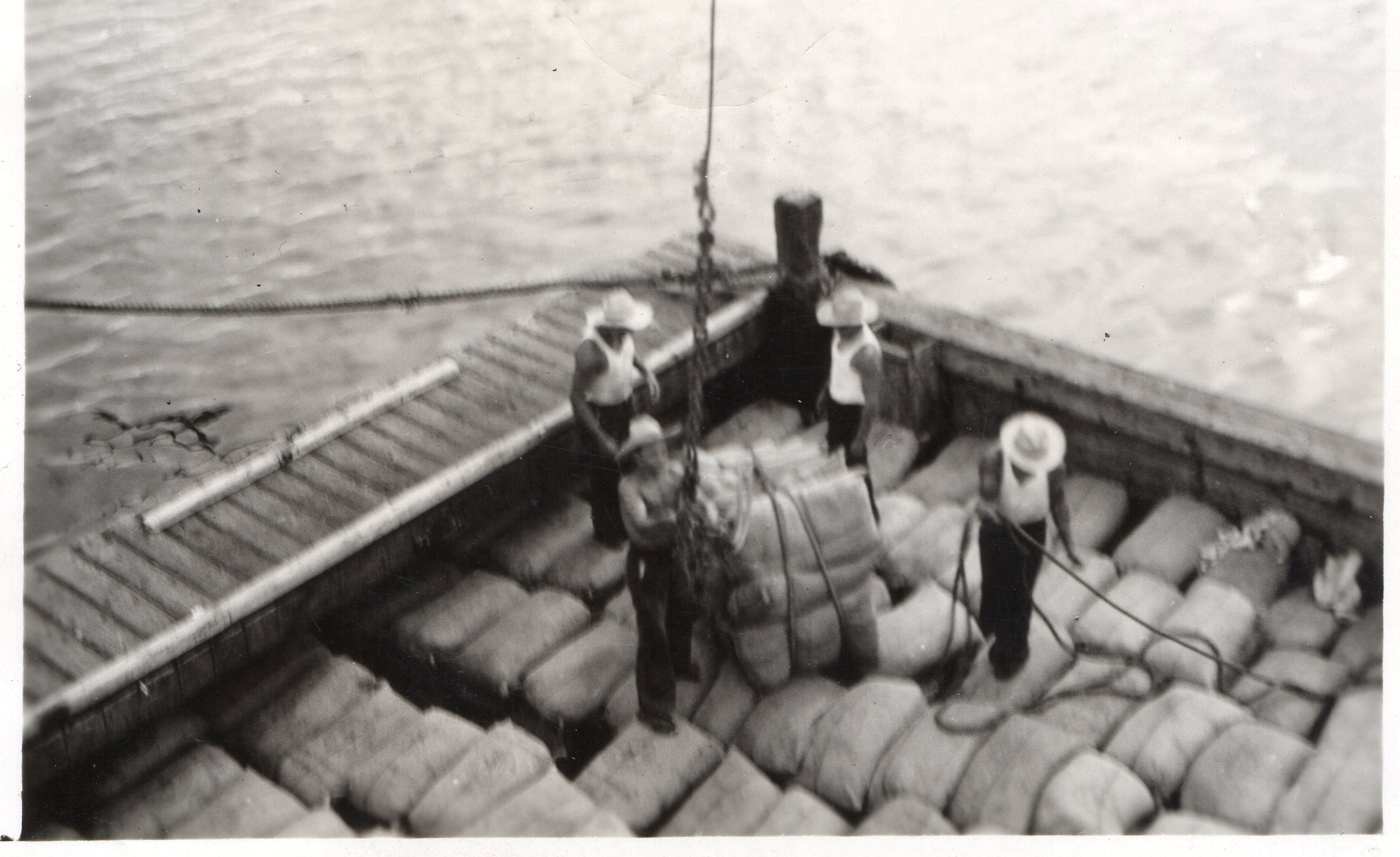 Priwall - Lautaro